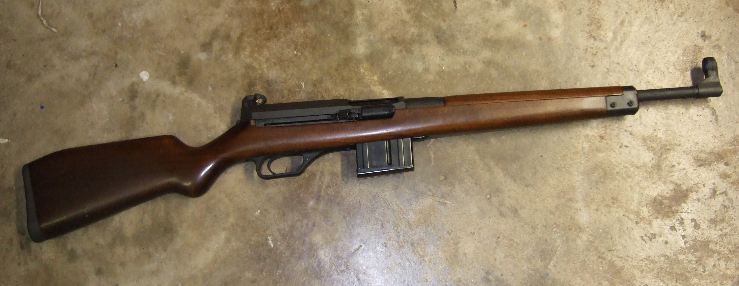 SL7 in der Seitenansicht